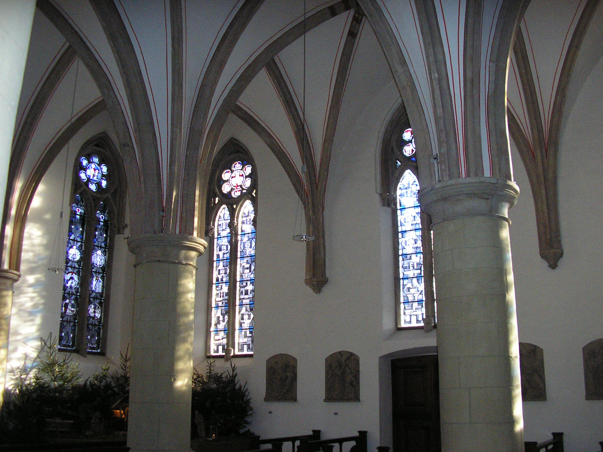 Stromberg St. Lambertus